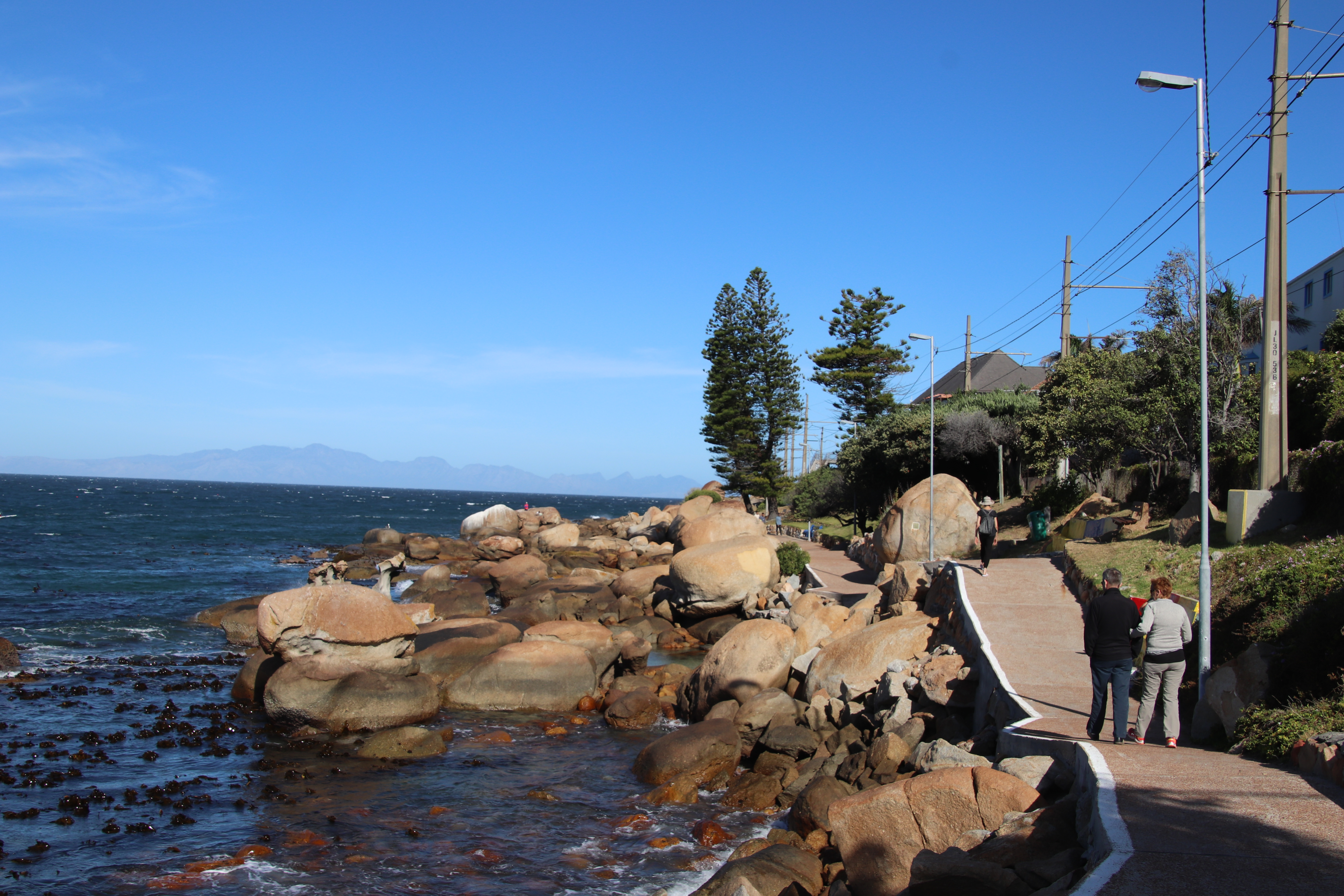 Fish Hoek, sog. "Jager-Walk" entlang der Küste